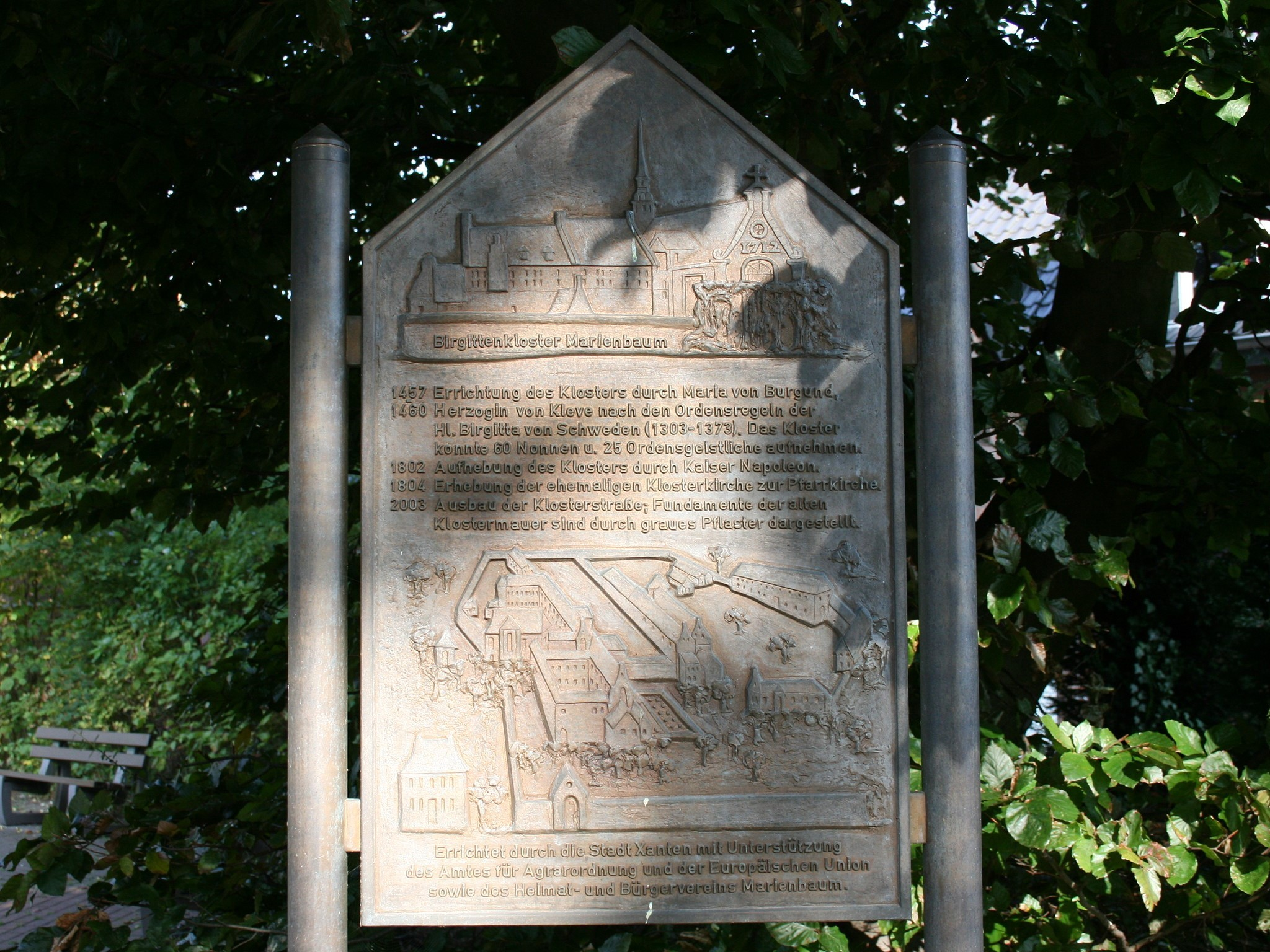 Xanten-Marienbaum